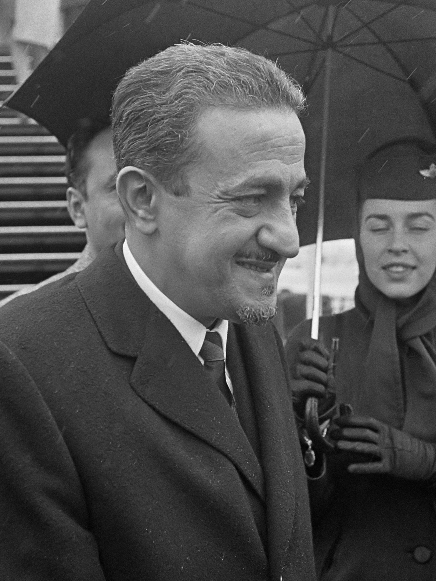 In de stromende regen arriveerde prins Abdullah Al Feisal van Saoedi-Arabië op Schiphol om hier drie dagen een privé-bezoek te brengen 18 april 1966